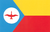 한국의 독립운동단체 흥사단의 깃발